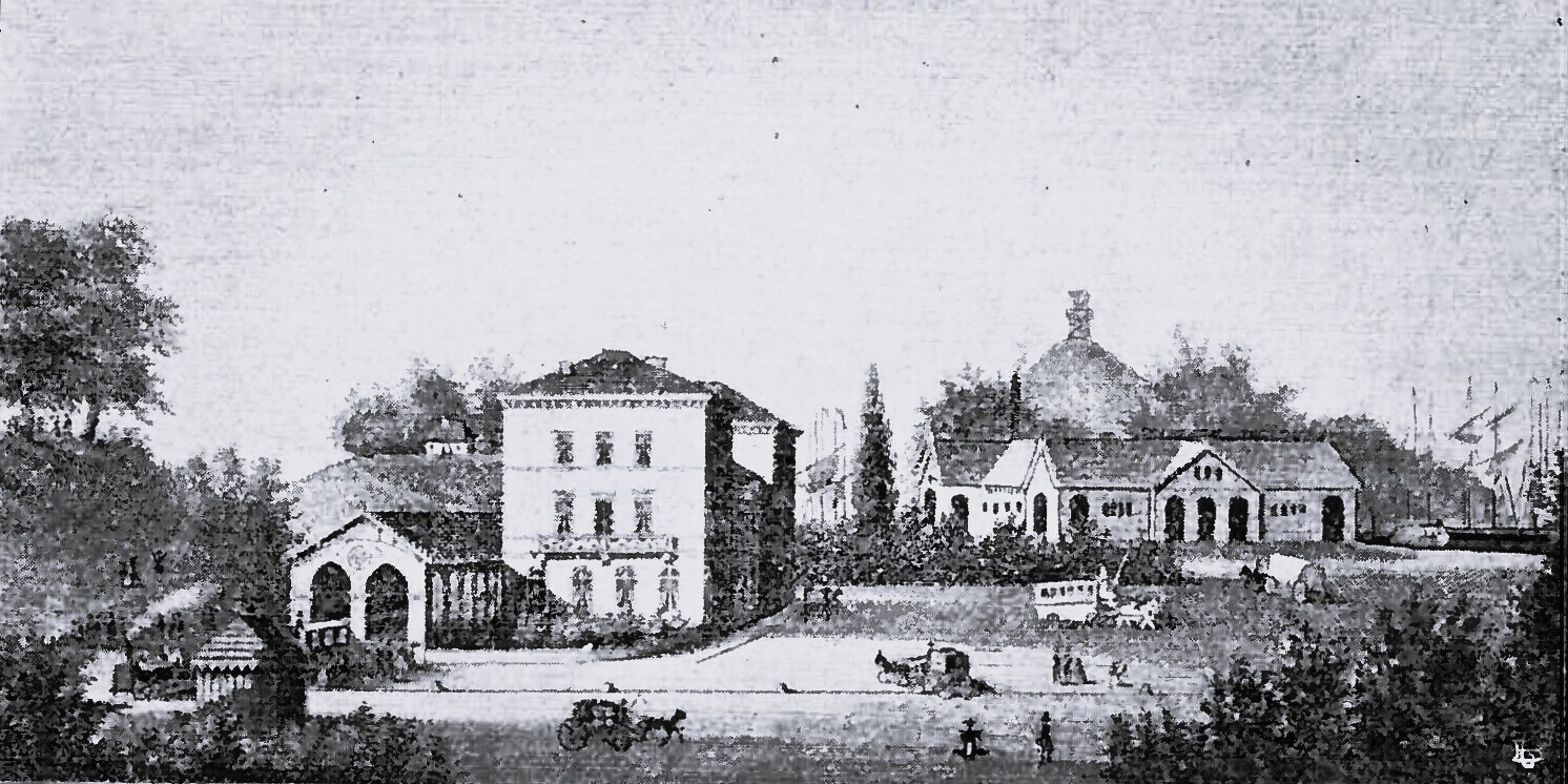 Der Bahnhof zu Lübeck zur Zeit der Eröffnung 1851. Von links nach rechts: Wallanlagen, Wallhalle, Empfangsgebäude, Holzhafen, Chimborasso hinter Güterbahnhof, Hafen.